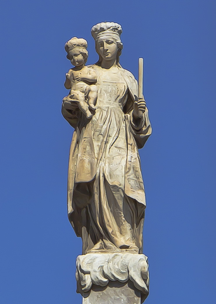 Maria Candelaria auf dem Denkmal der Plaza Candelaria in Santa Cruz de Tenerife